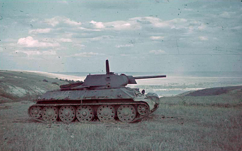 Abgeschossene sowjet. Panzer